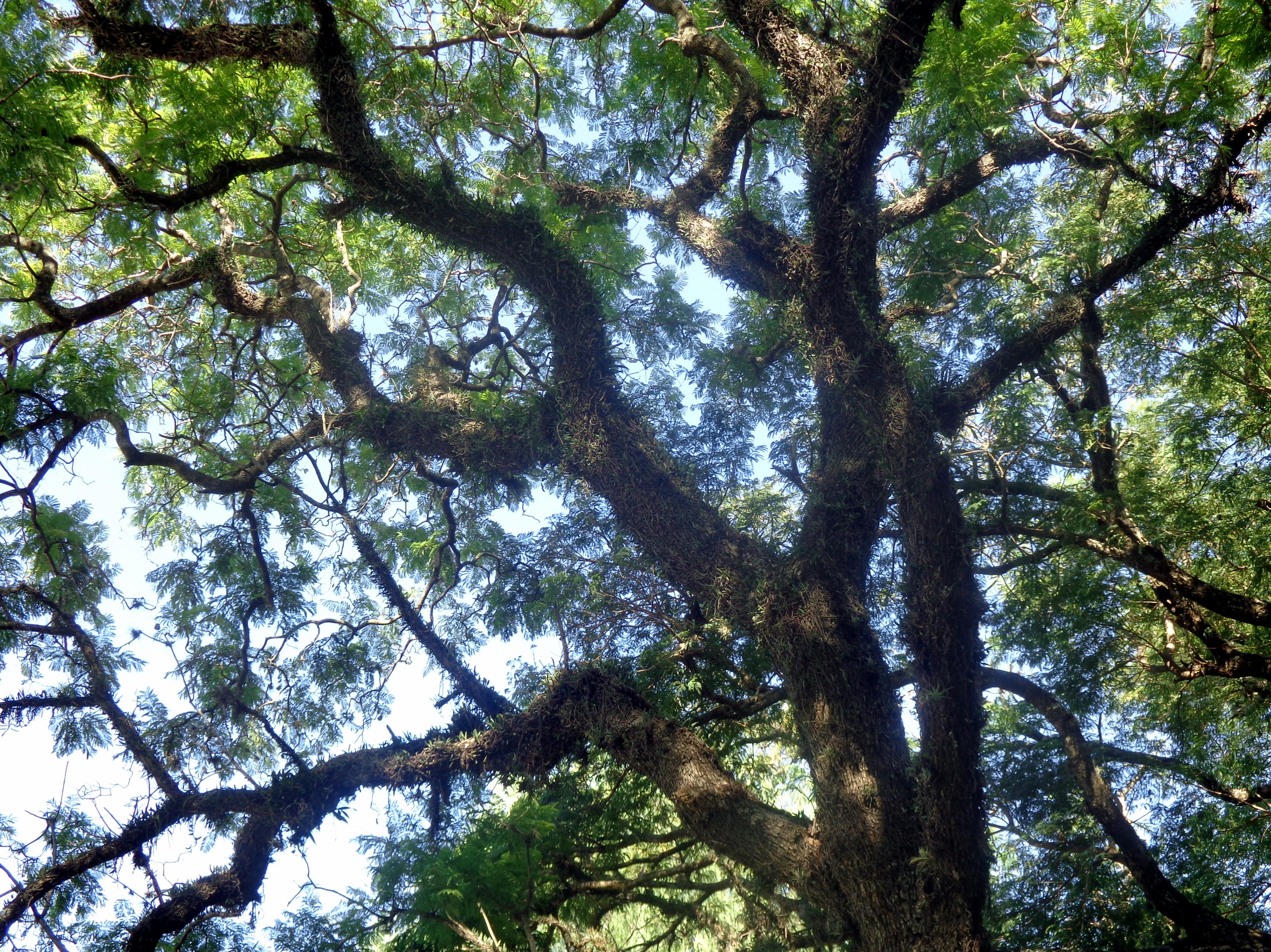 Claveles del aire sobre un árbol en San Isidro, Buenos Aires, Argentina.